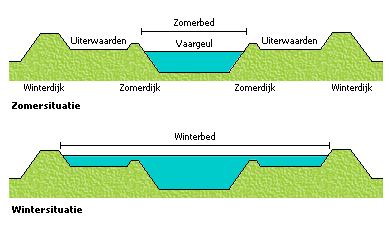 Eigen creatie